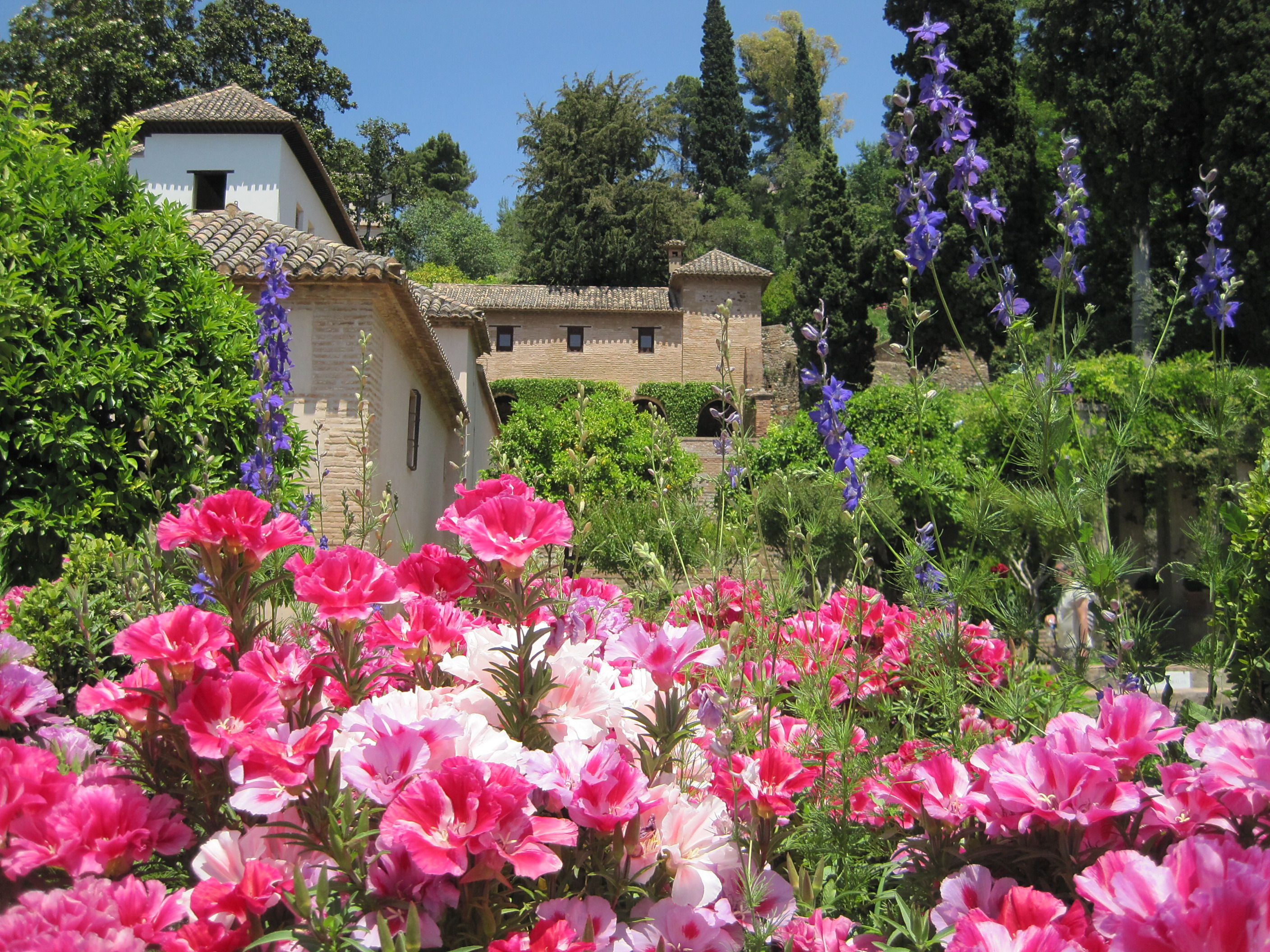 Alhambra y Generalife_UNIQcd63d1f3db5e4987-ref-00000021-QINU_